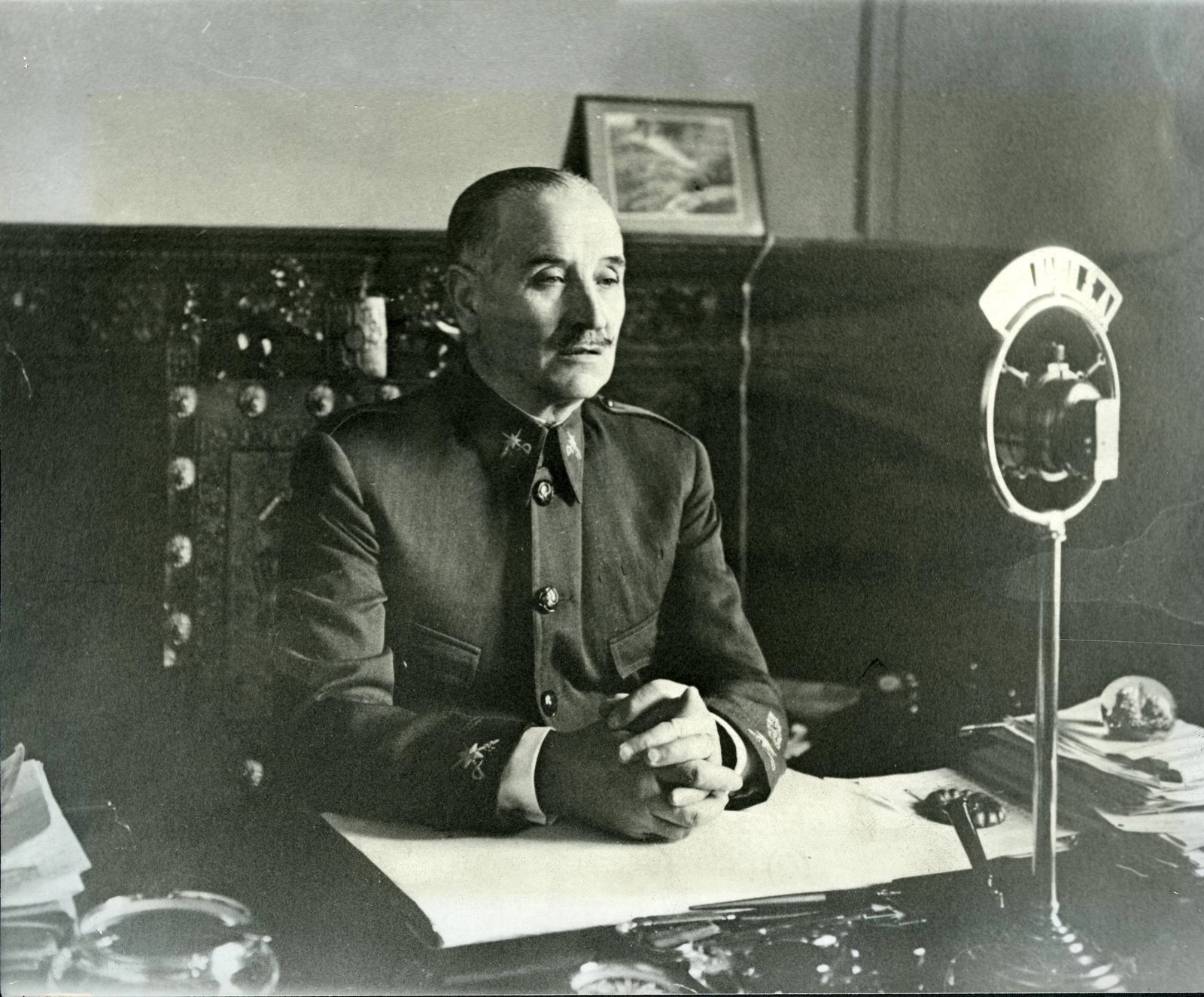 Fotografía del general del ejército español.